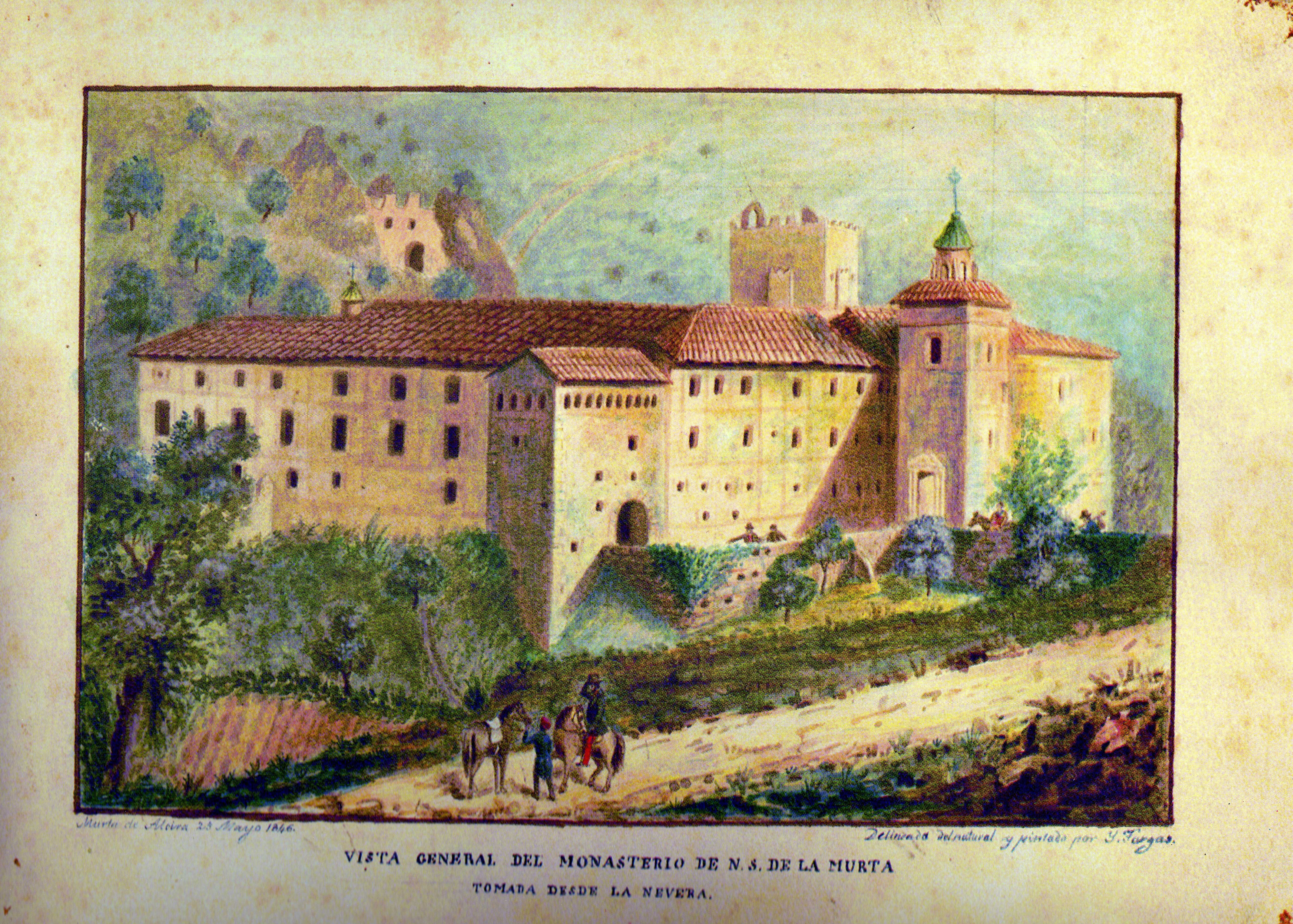 Aquarel·la del monestir de la Murta (Alzira) en 1846, poc després de la Desamortització.